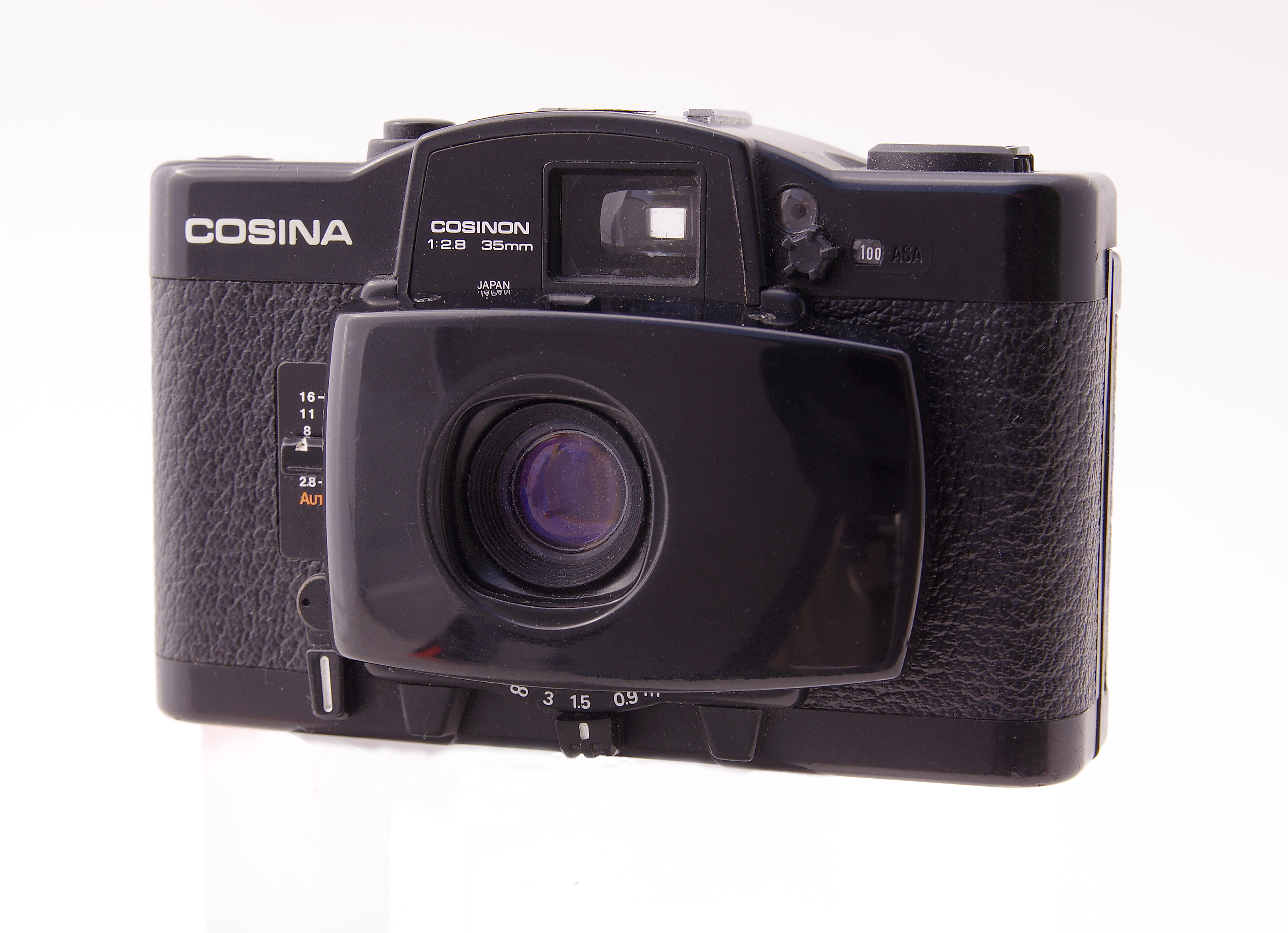 Cosina CX-2